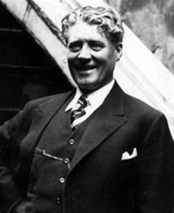 portrett, mann, skuespiller, teatersjef, stående helfigur.